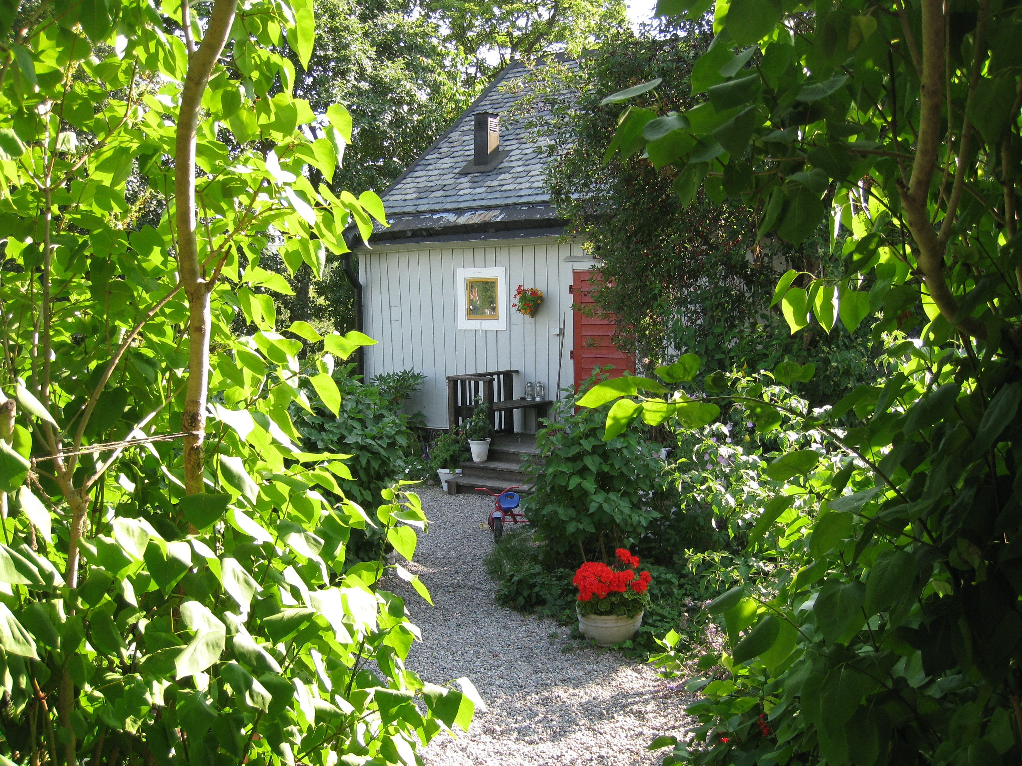 Mangelbodvillan i Äppelviken i Bromma tillhör "Mälarstrandens sommarbebyggelse".